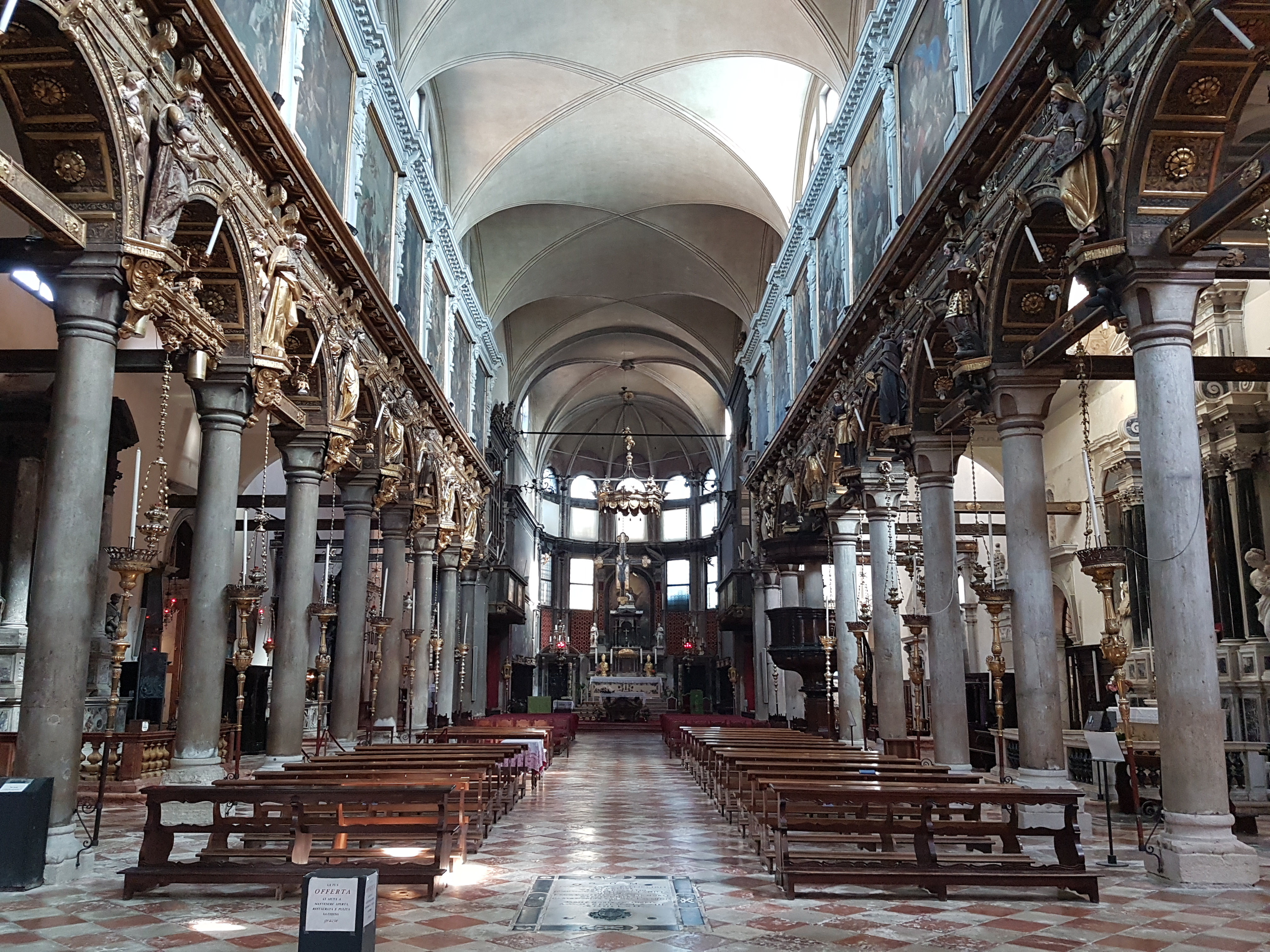 Santa Maria dei Carmini (Venice), Innenraum